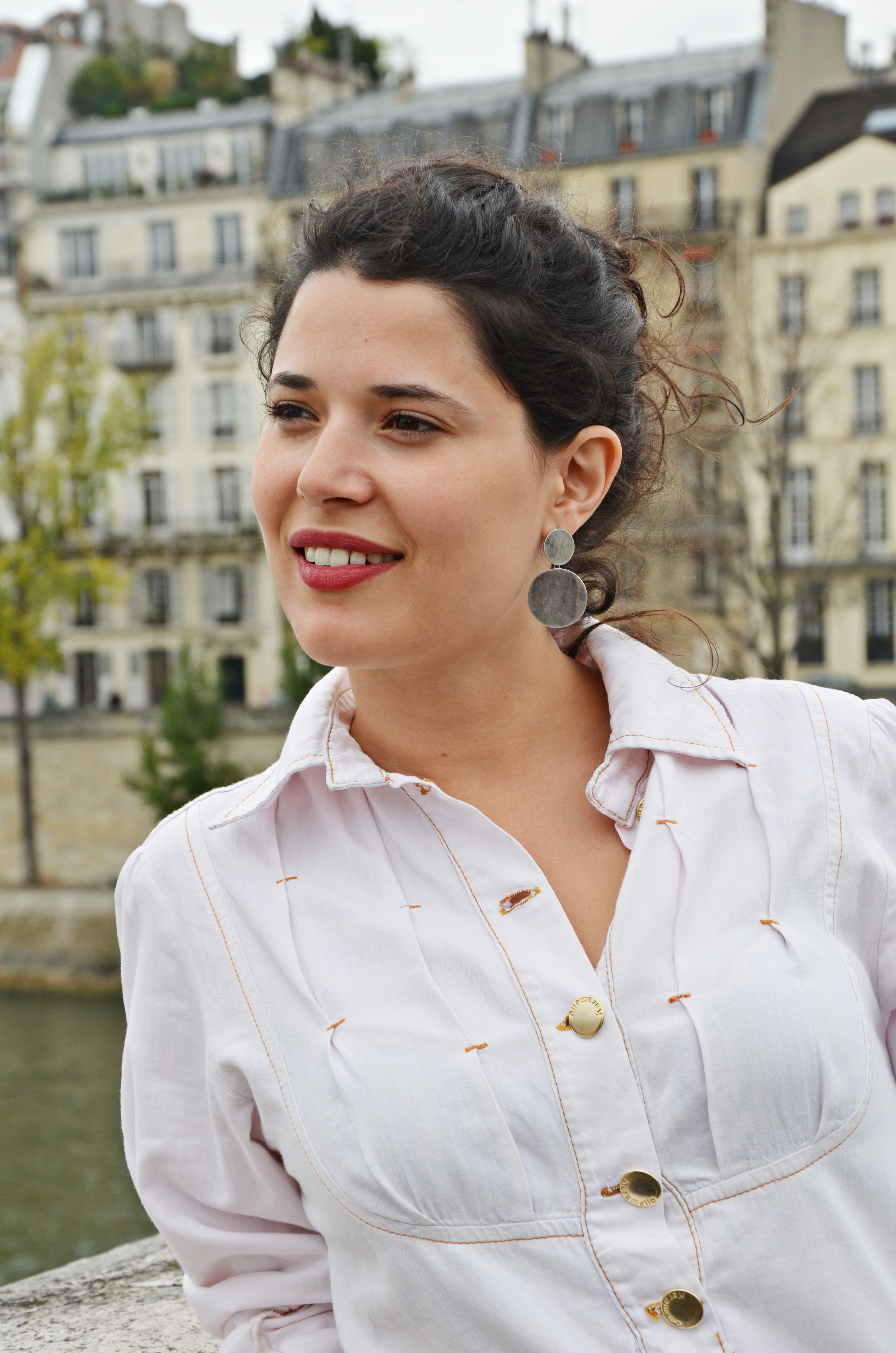 Manuela do Monte by Felipe Pilotto 2011 EUROPA PARIS 3376